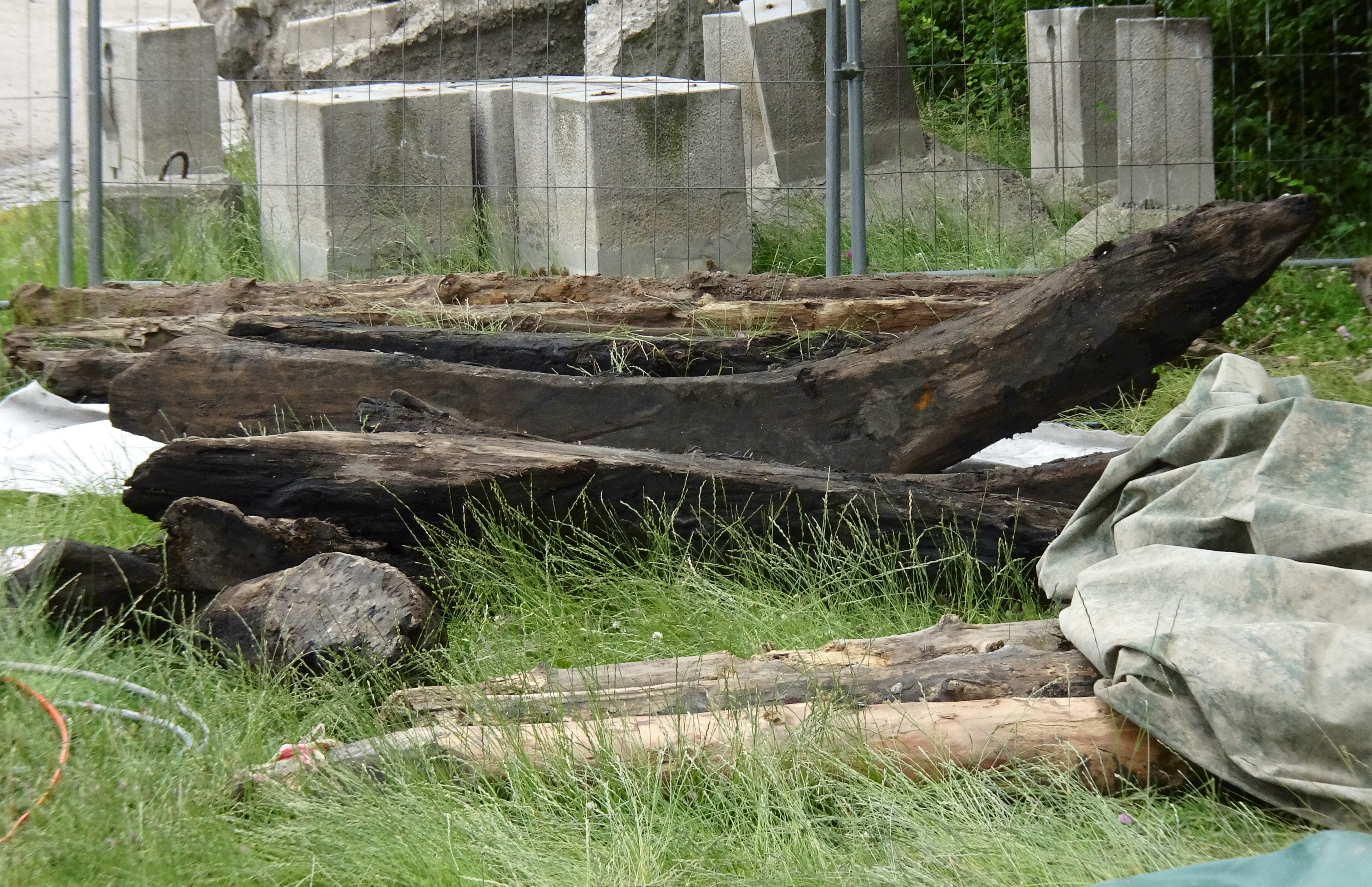 Skeppsholmen fartygsfynd, varkdelar